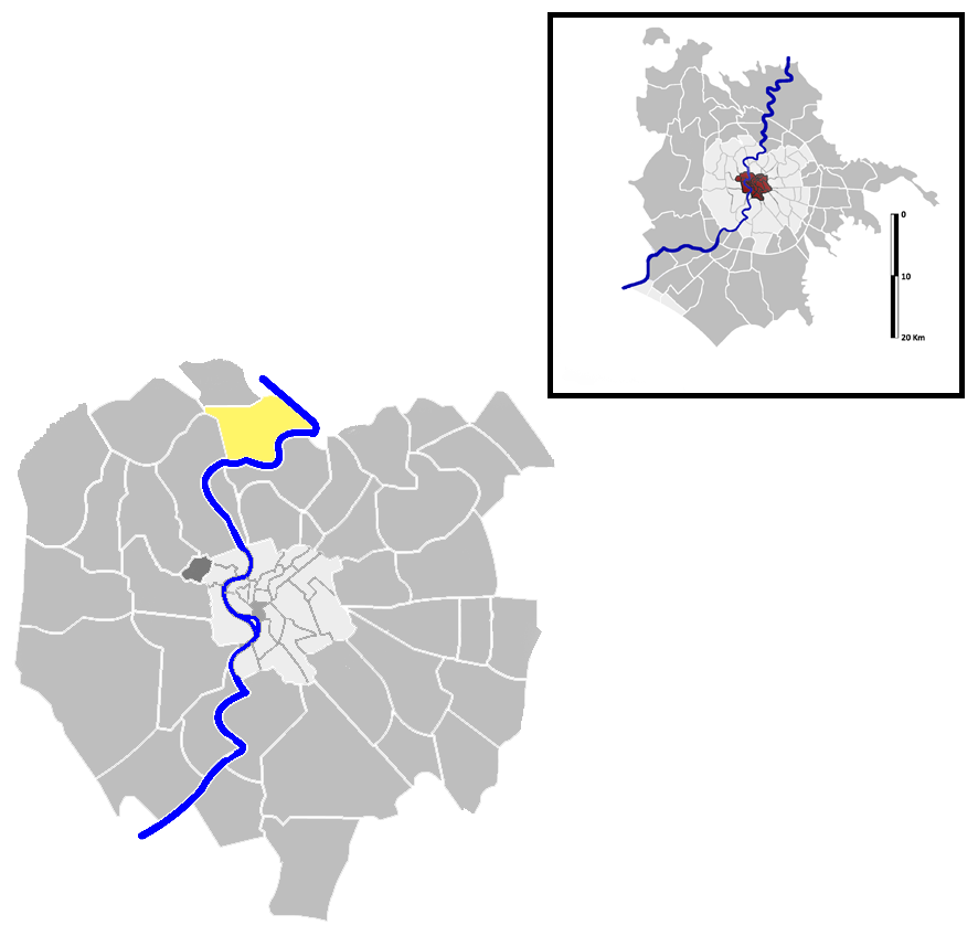 Tor di Quinto